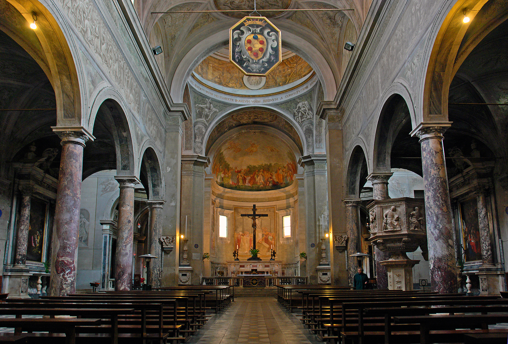 Pietrasanta, Pietrasanta, Dom, Innenansicht